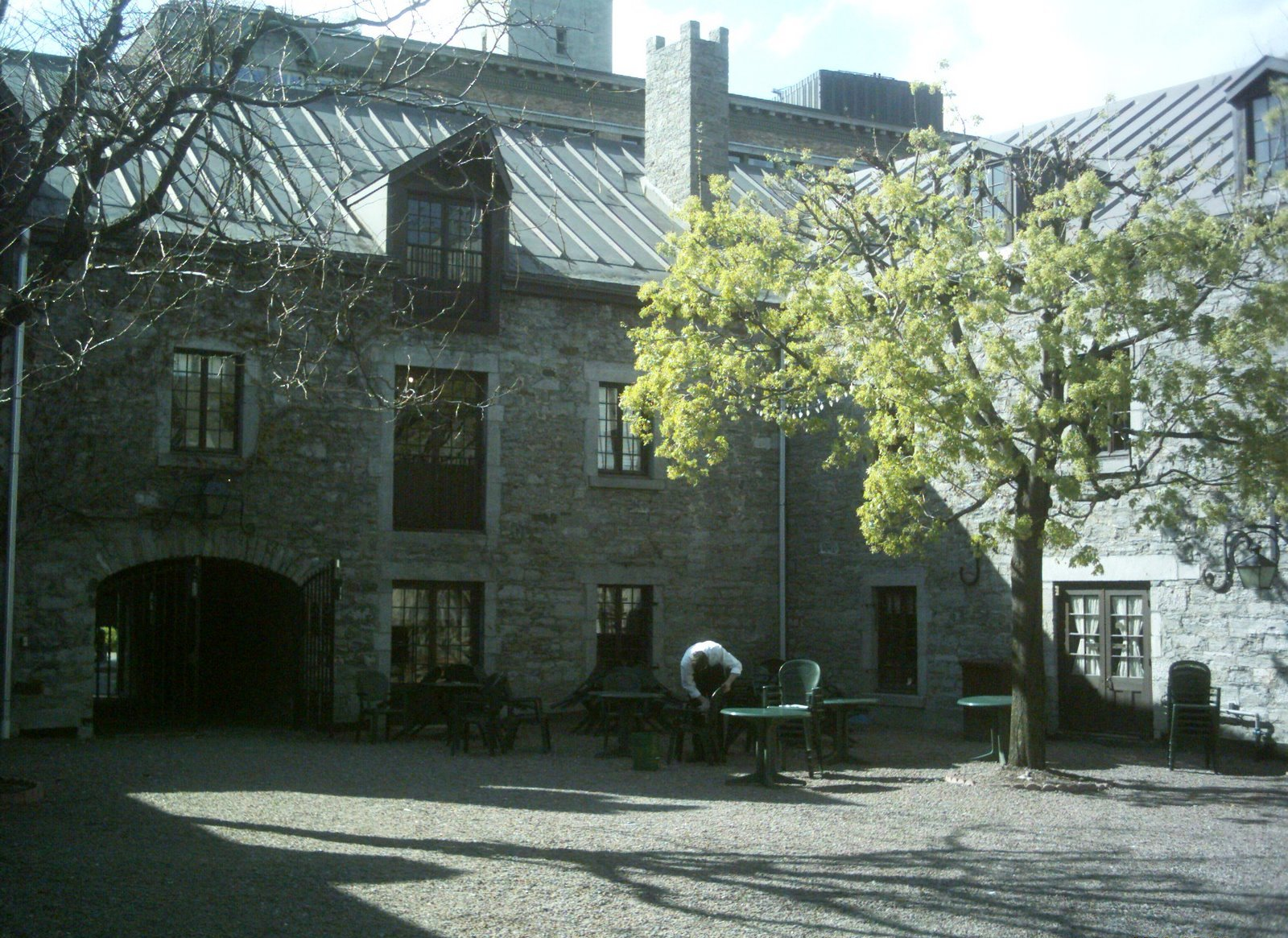 Cour intérieure des Écuries d'Youville, 300 place d'Youville, à Montréal